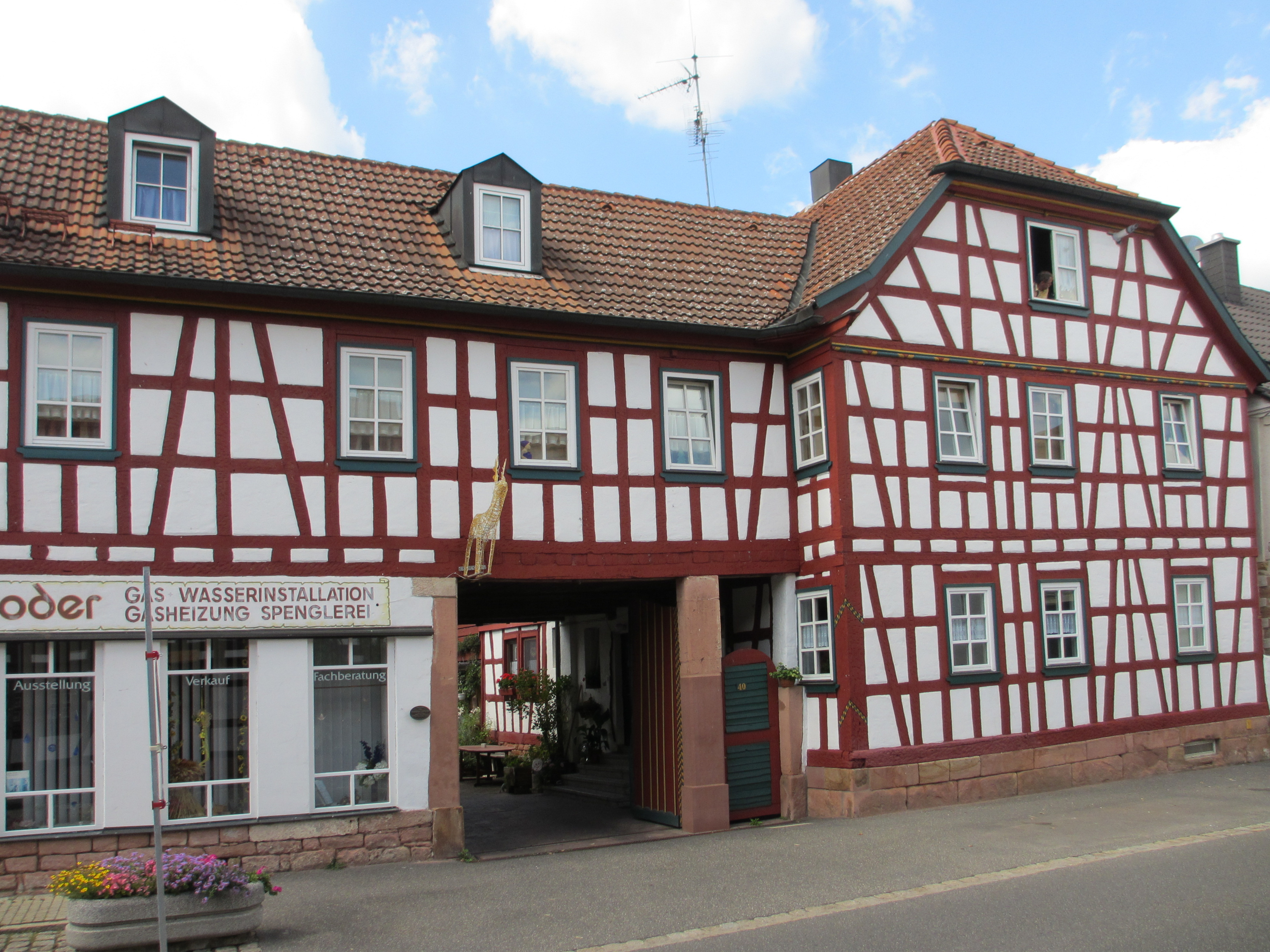 D-6-76-144-21 - Niedernberg, Hauptstraße 40